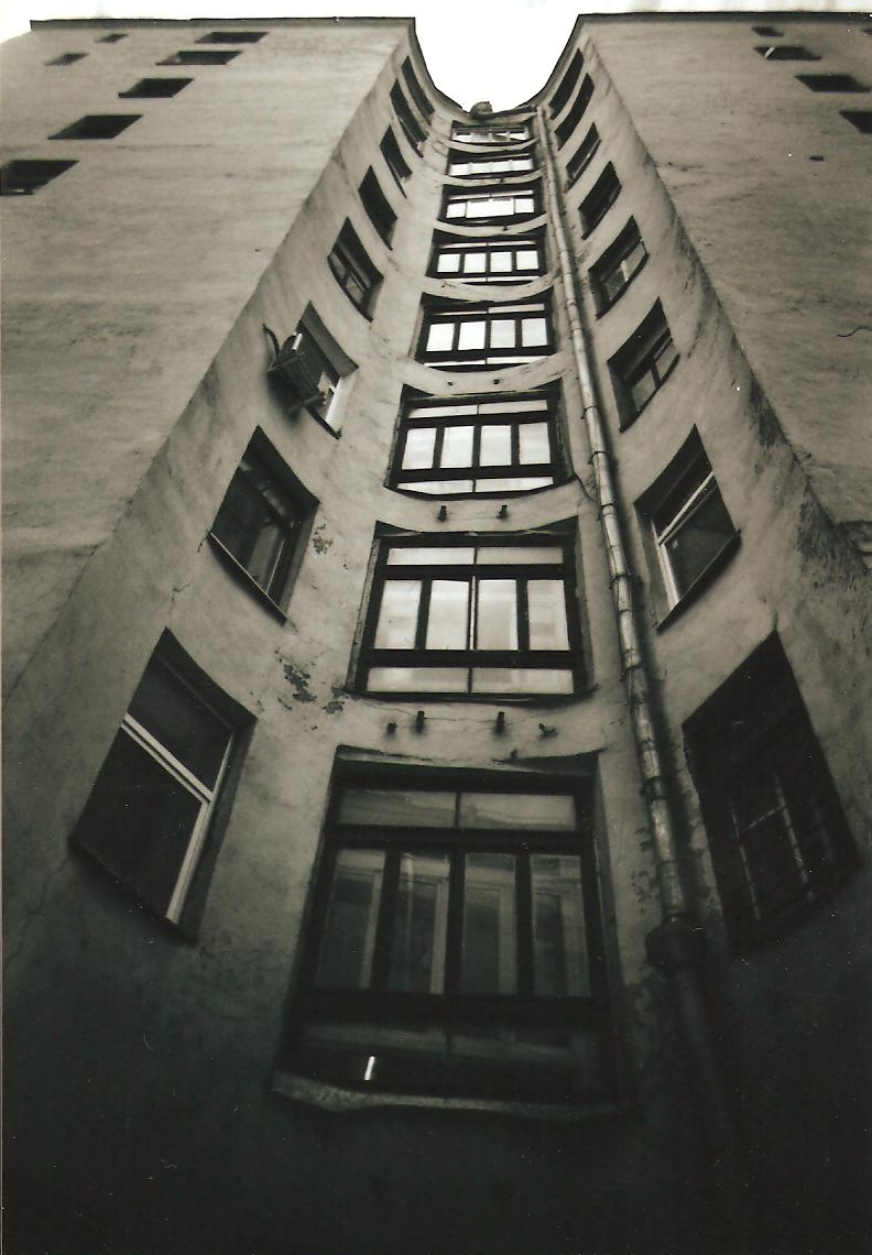 Москва, Большой Гнездниковский переулок, дом 10. Вид со двора.